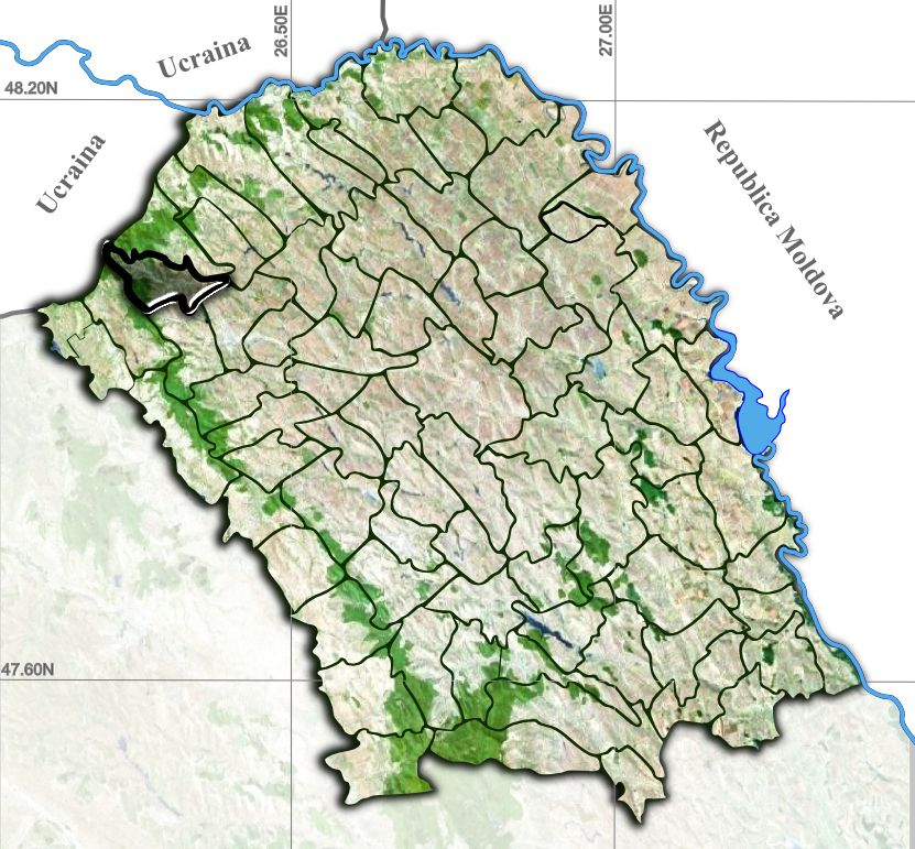 Hiliseu-Horia jud Botosani.